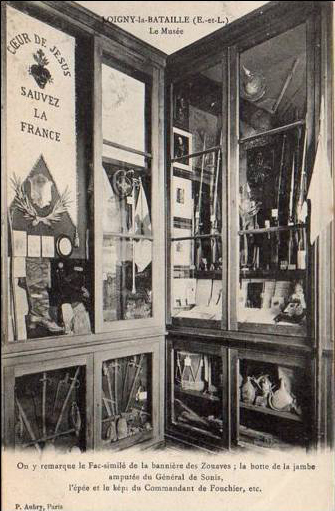 Le 1er musée de la guerre de 1870, à Loigny-la-Bataille, en 1907